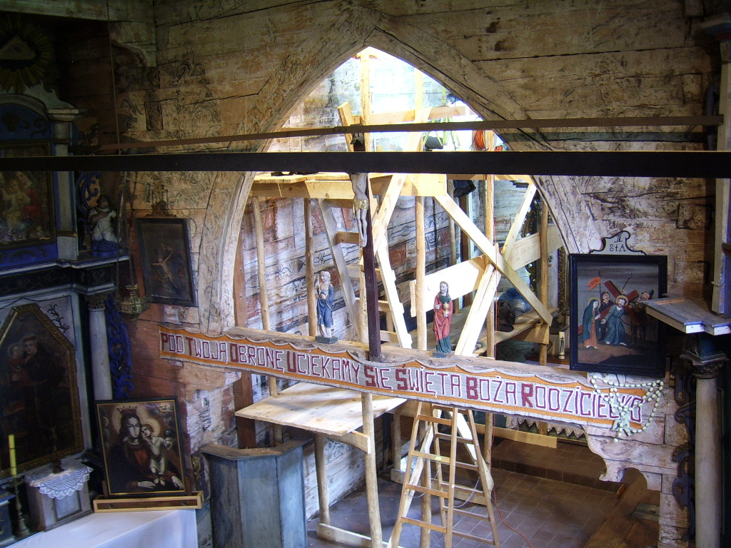 Wnętrze kościoła w Iwkowej. Licencje CC